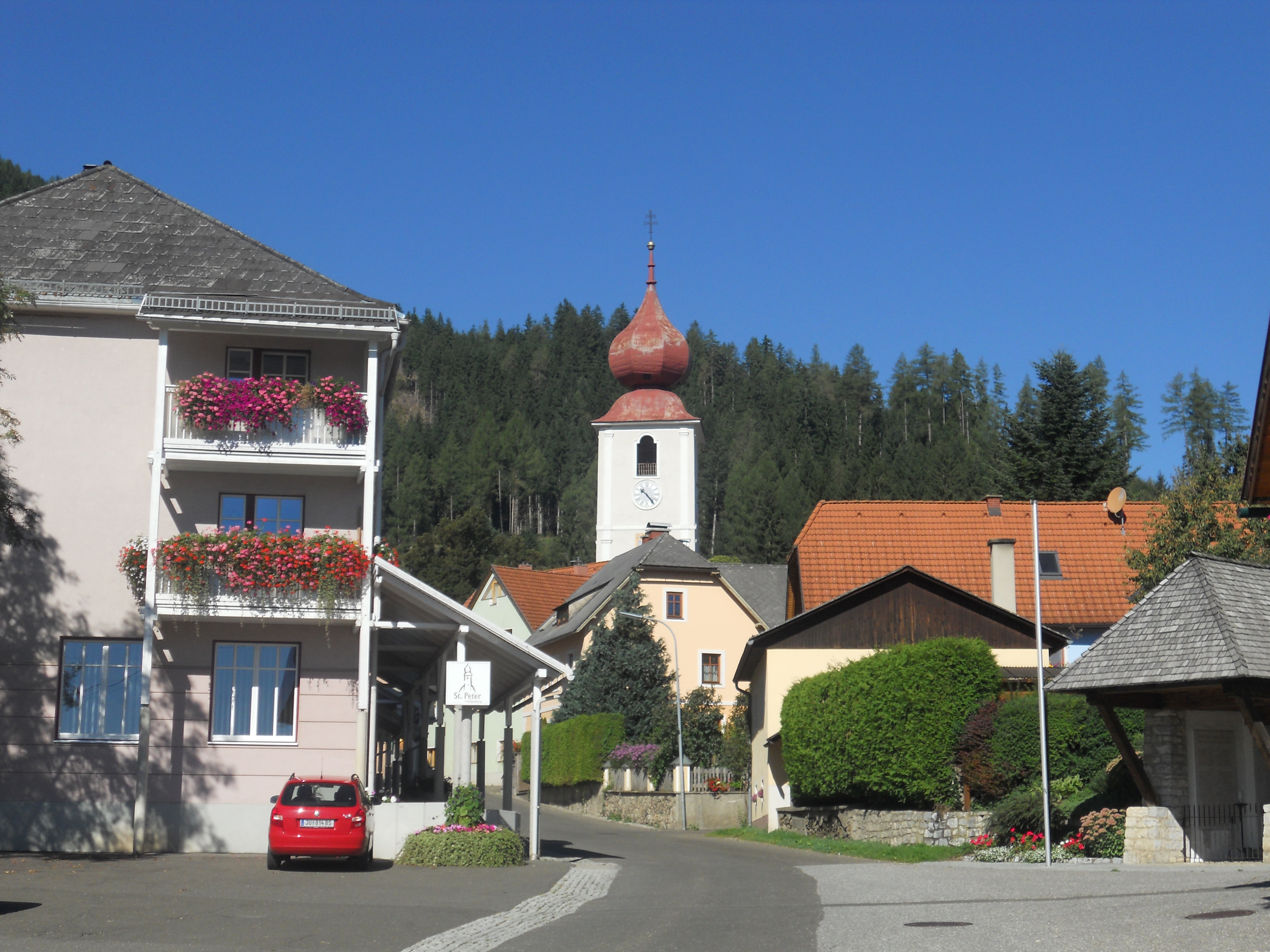 Sankt Peter ob Judenburg, Ortszentrum